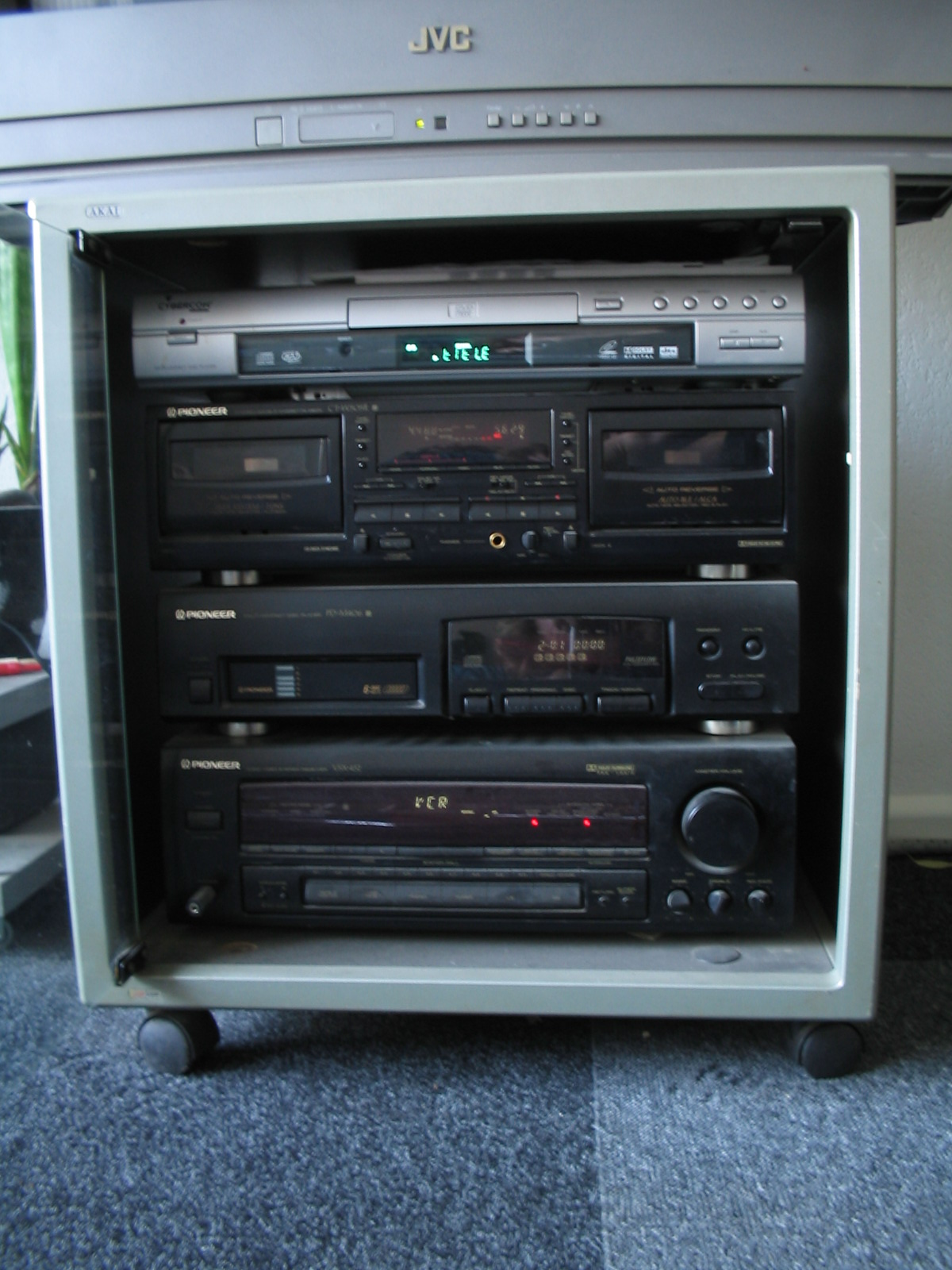 losse componenten, stereotoren Categorie:Wikipedia:Afbeeldingen/Gebruiker:Michiel1972